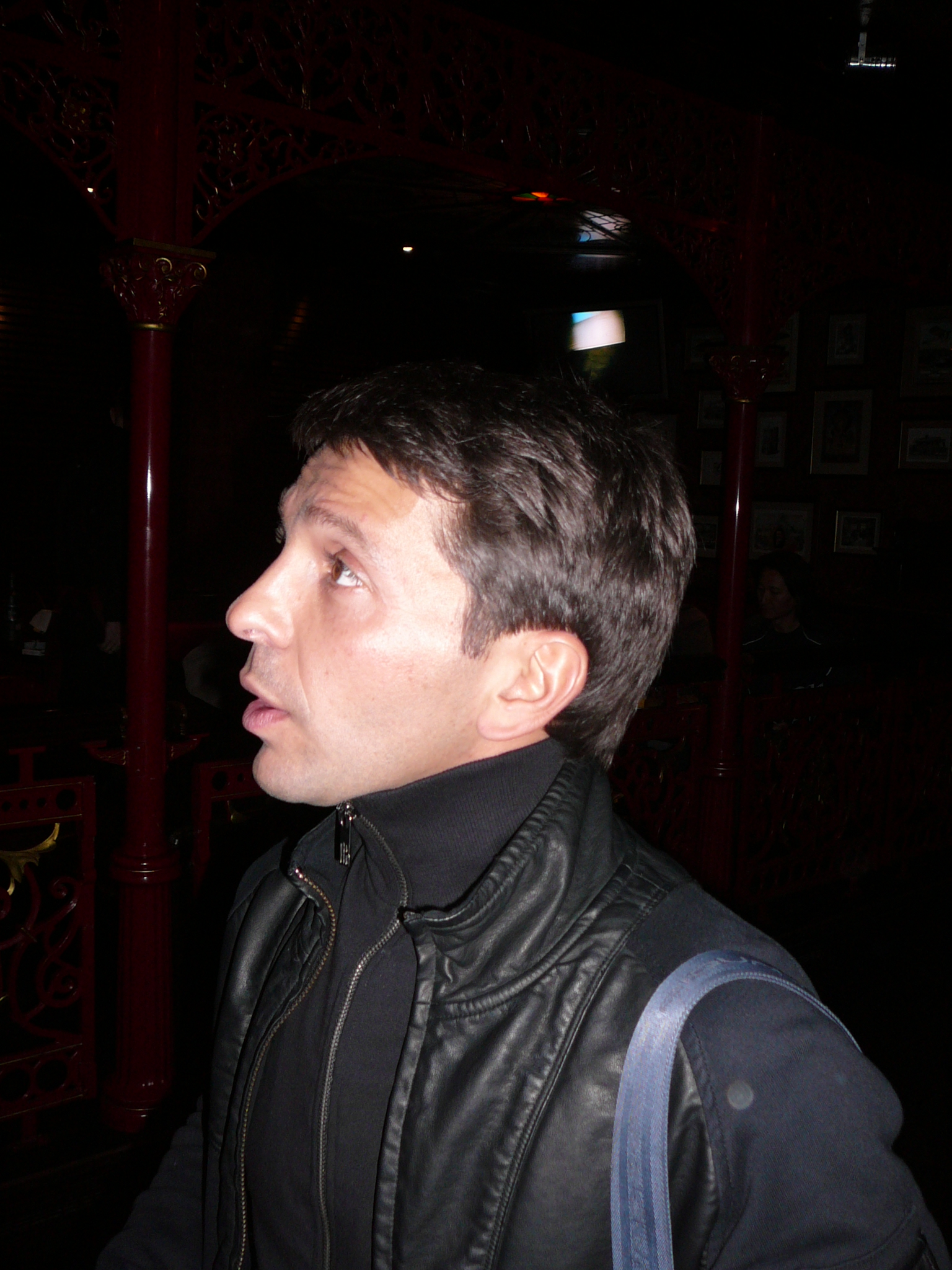 Российский актёр, режиссёр, сценарист Леонид Барац